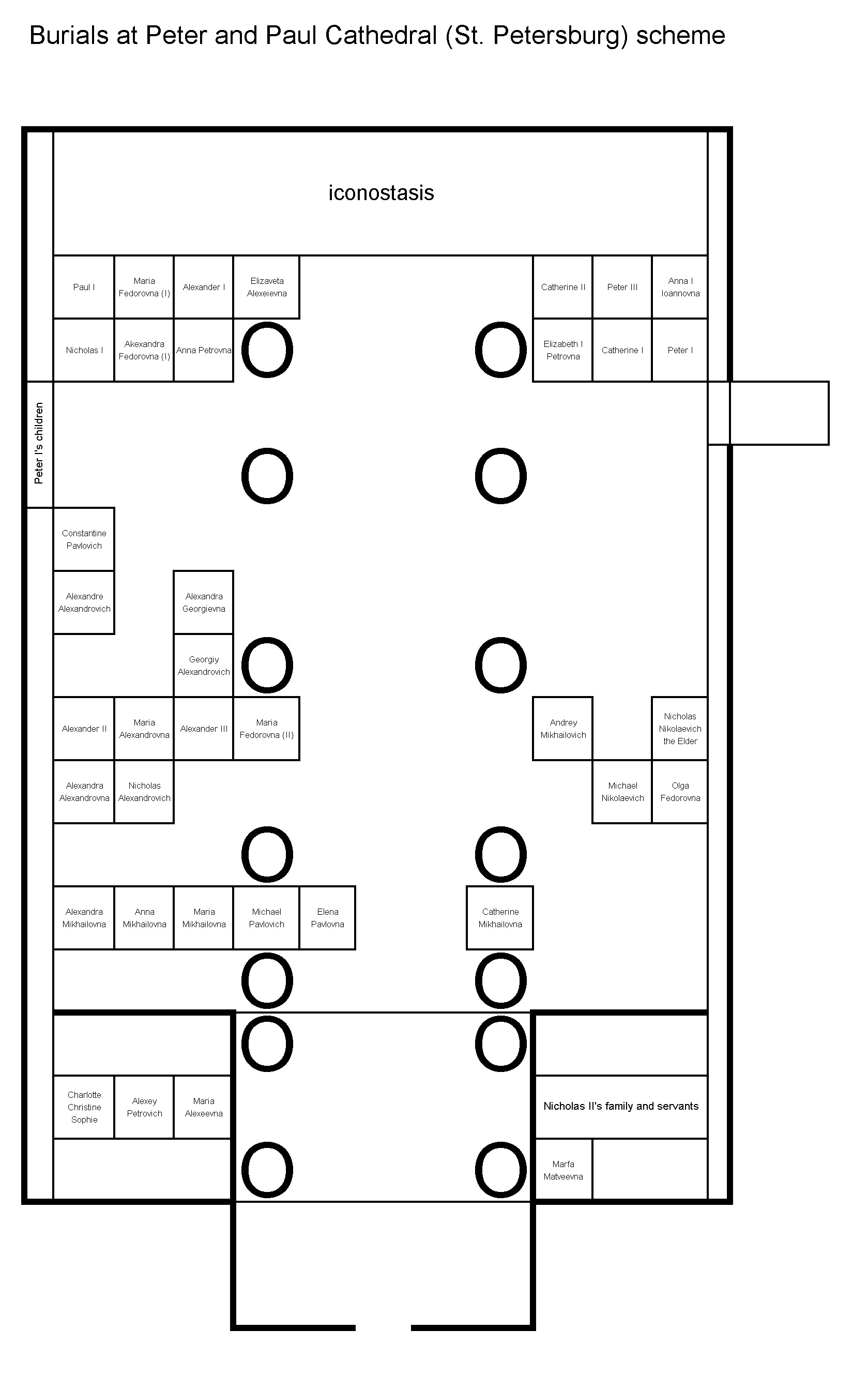 Схема захоронений в Петропавловском соборе